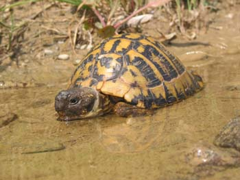 WegehauptBaden